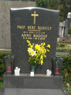 Bert Rudolf Grabstätte